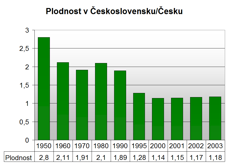 Plodnost v Československu/Česku